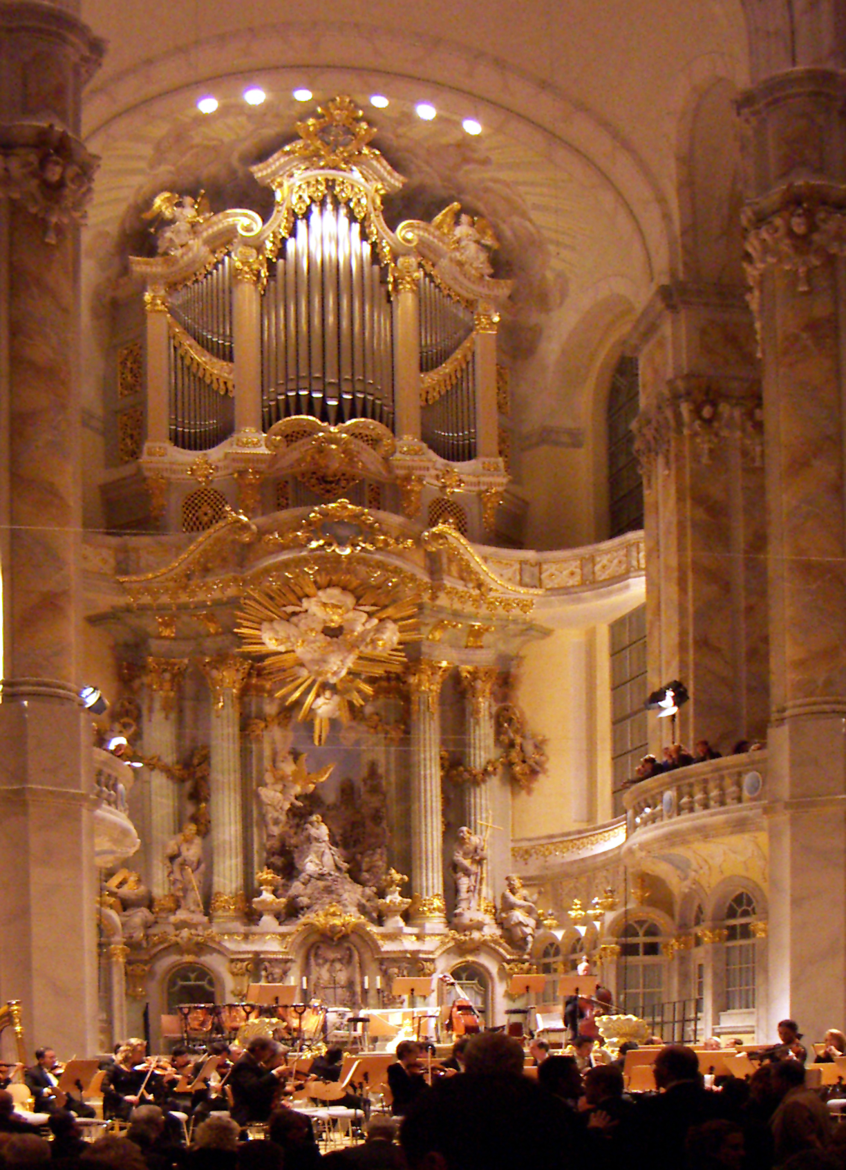 Die Orgel der Dresdner Frauenkirche. Datum: Erstes internationales Konzert nach der Weihe: das New York Philharmonic Orchestra (Ltg.: Lorin Maazel) in Dresden, 11/2005